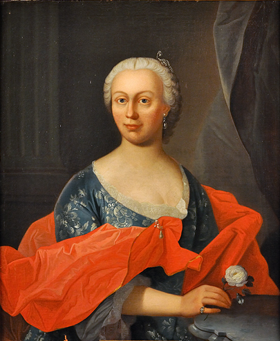 Bildnis der Katharina Rebecca Senckenberg (1716-1747), geborene von Mettingh, seit 1744zweite Ehefrau von Johann Christian Senckenberg. Freundin von Anna Rebecca Senckenberg, der ersten Ehefrau Senckenbergs. Verstorben im Jahr 1747 an Tuberkulose, auch der gemeinsame Sohn verstarb daran.